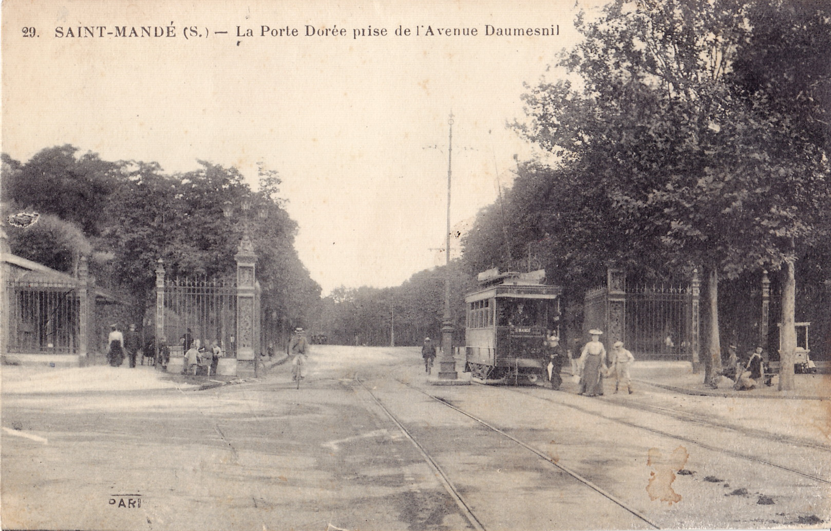 Carte postale ancienne éditée par FF à Paris, n°29 : SAINT-MANDE - La Porte Dorée prise de l'Avenue Daumesnil